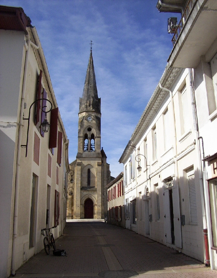 L'église Saint-Pierre à Salles